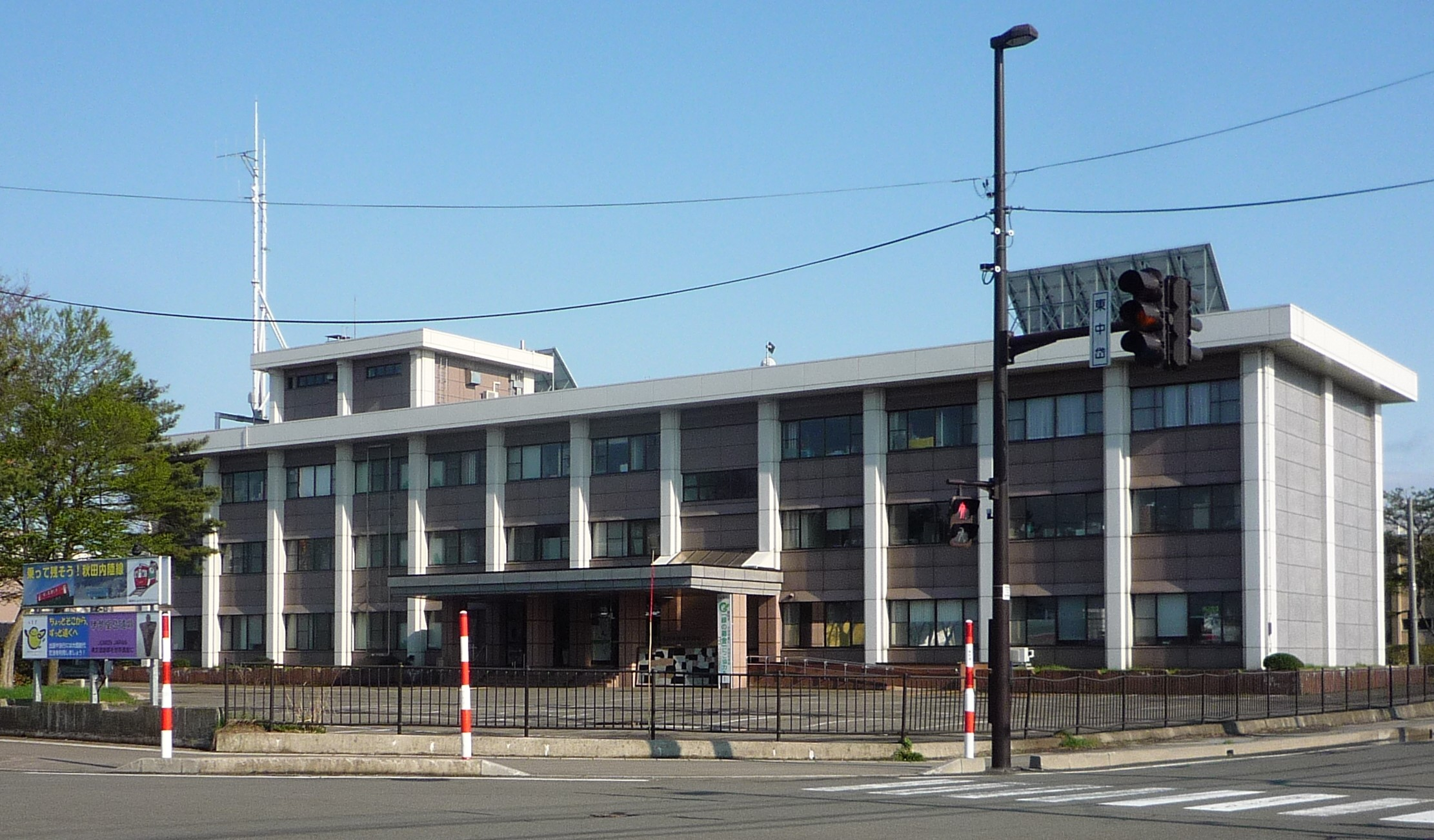 北秋田地域振興局